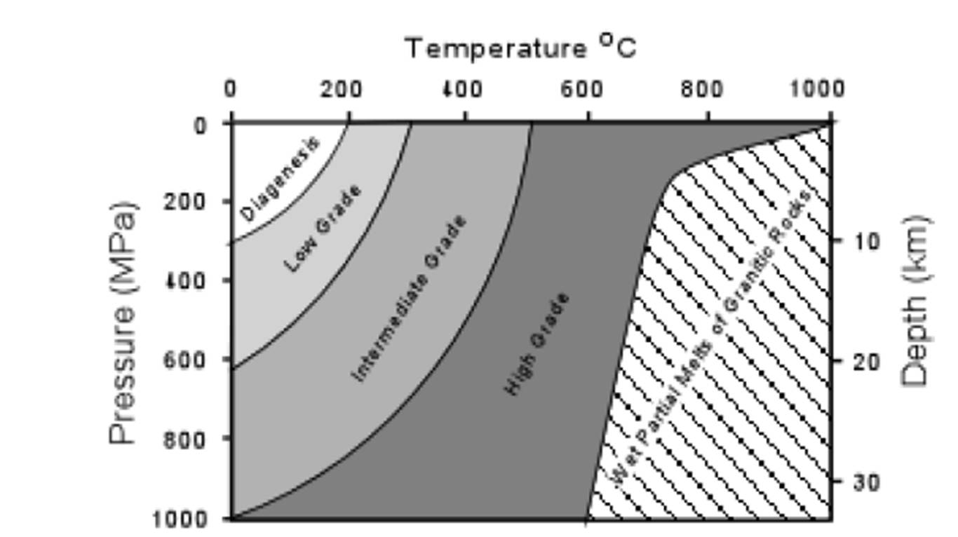 ตารางแสดง Prograde and Retrograde of metamorphic